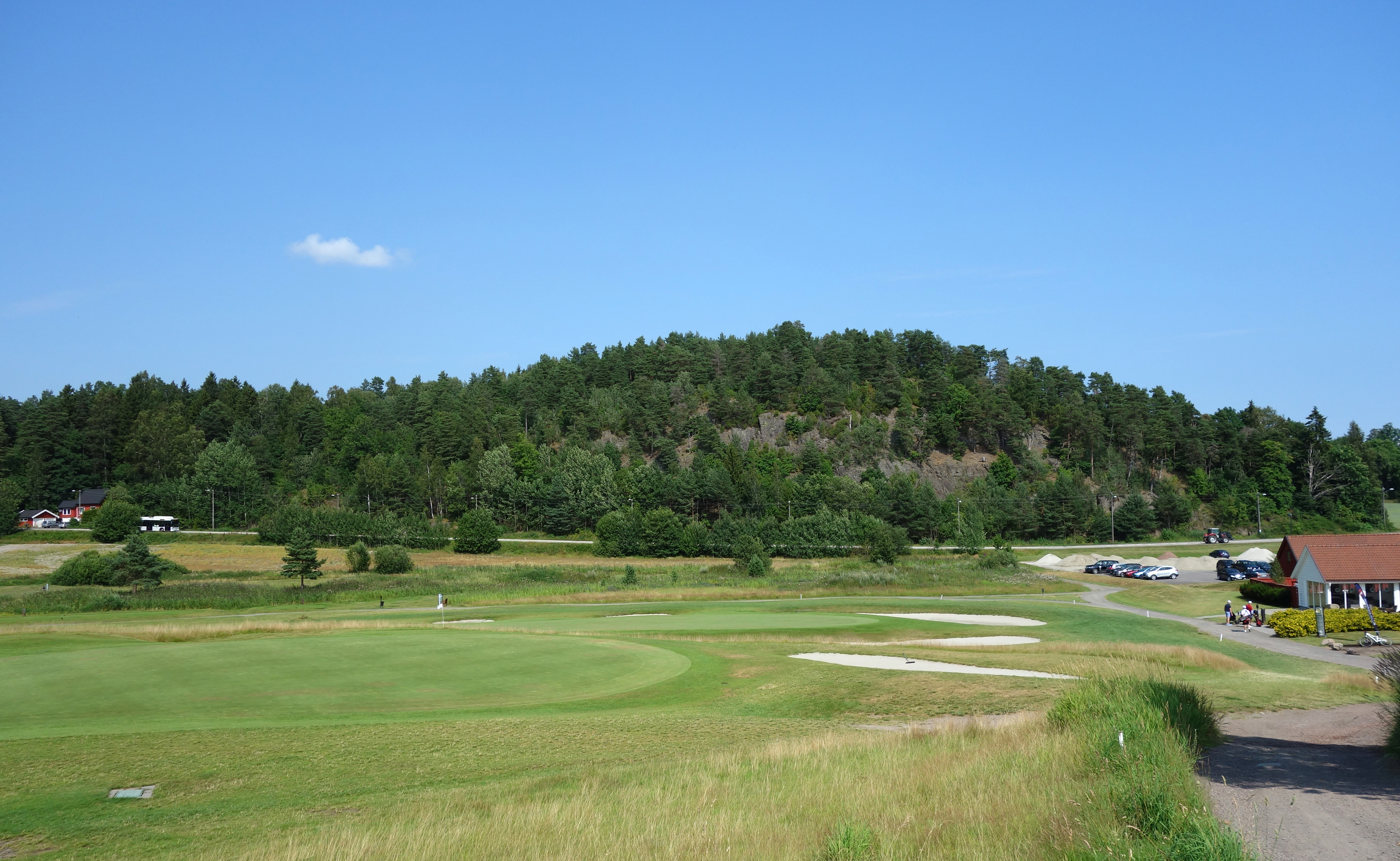 Magnhildås på Nøtterøy, med Nøtterøy golfbane i forgrunnen